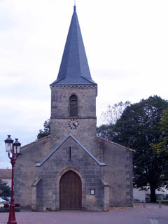 Eglise de Canejan dans le departement de Gironde